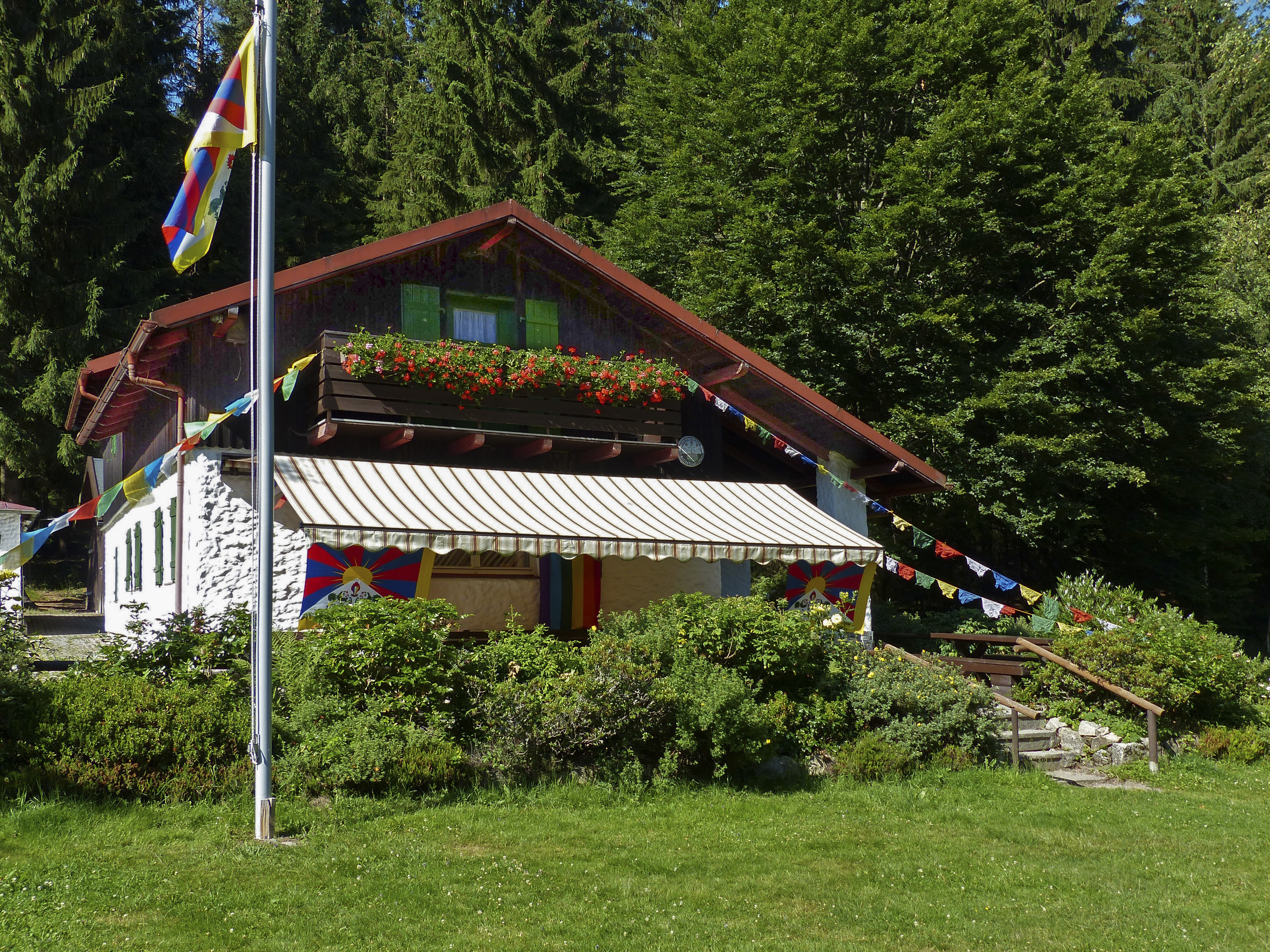 Zigeunermühle beim 80. Geburtstag des Dalai Lama